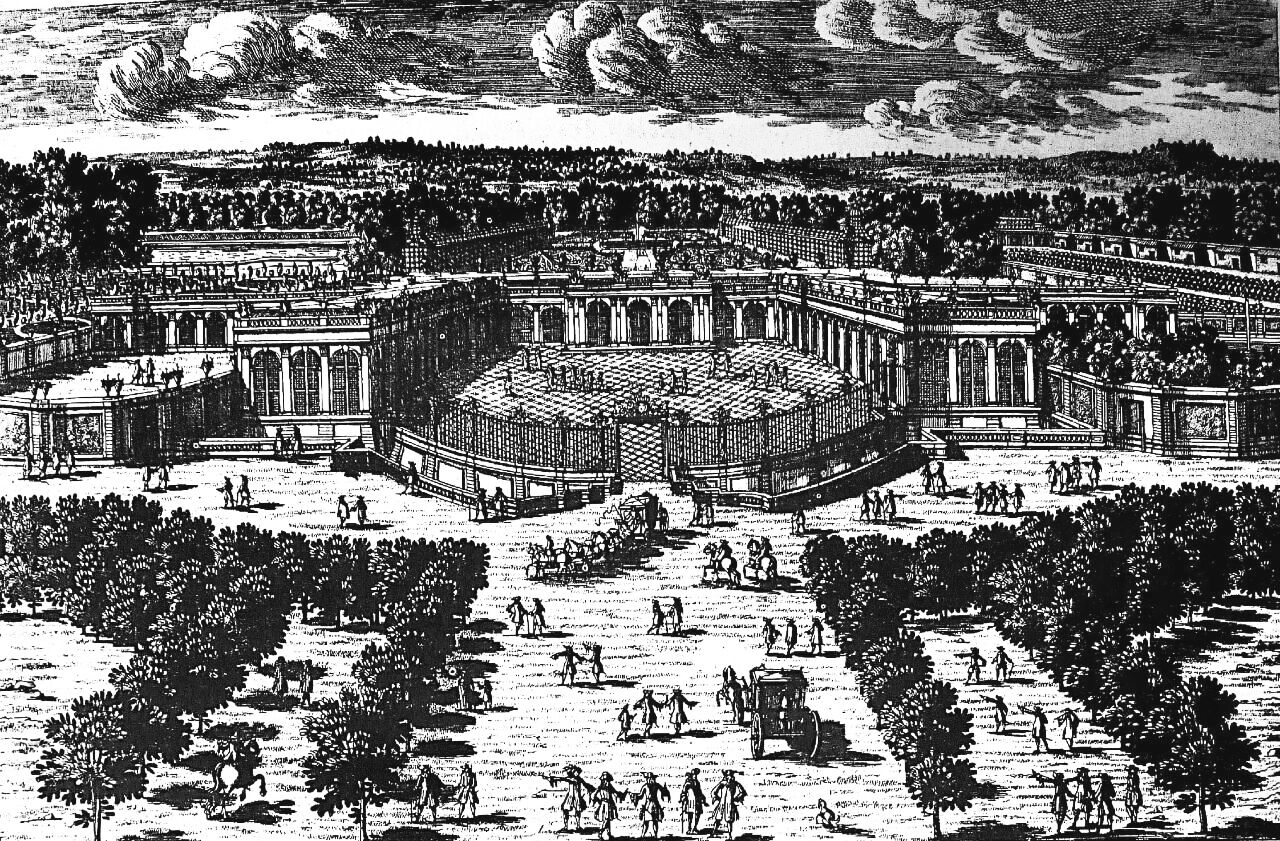 Grabado del Grand Trianon (Versalles). Aveline, 1687-88